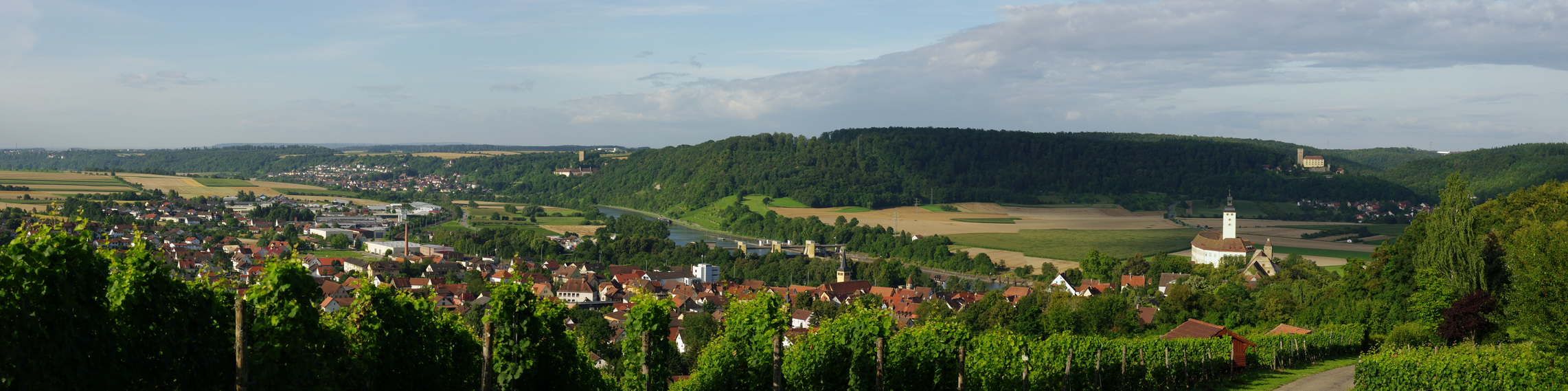 Neckartal bei Gundelsheim. Rechts: Schloss Horneck in Gundelsheim, darüber im Hintergrund: Burg Guttenberg in Haßmersheim. Links im Hintergrund: Burg Ehrenberg in Bad Rappenau.